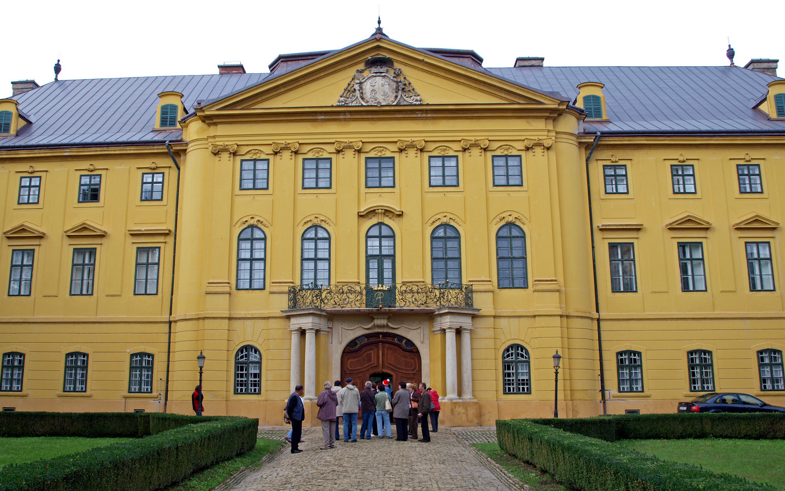 Érseki palota (Kalocsa, Szentháromság tér 1., Deák Ferenc utca 2., Szentháromság tér 1. - Deák Ferenc utca 2.) This is a photo of a monument in Hungary, Identifier: 2216